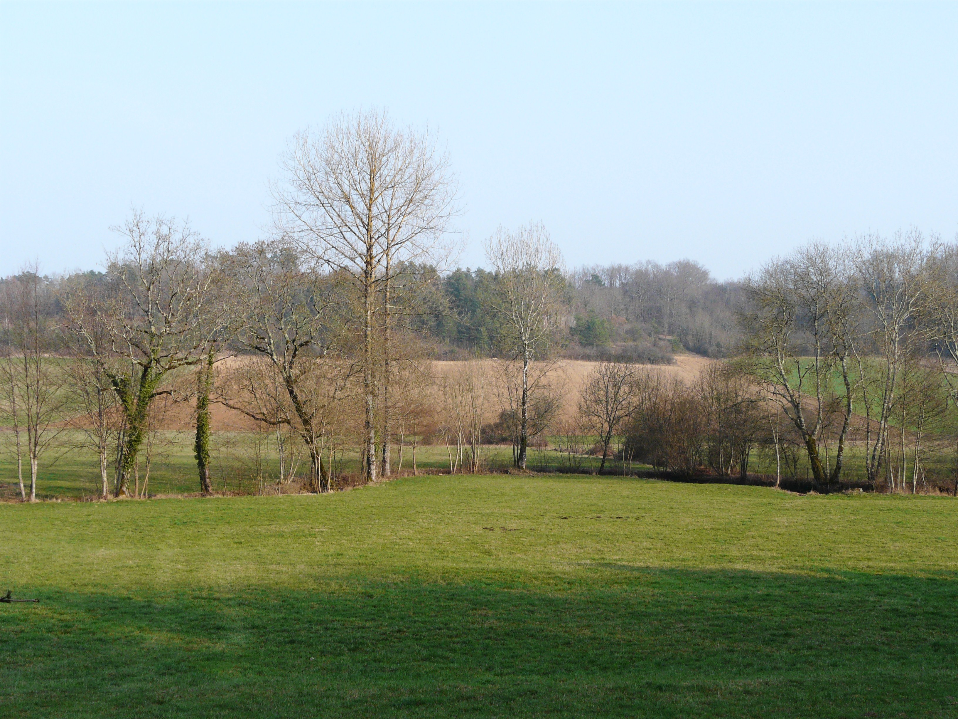 Le vallon du Boulou à l'est du lieu dit les Farges, Paussac-et-Saint-Vivien, Dordogne, France.